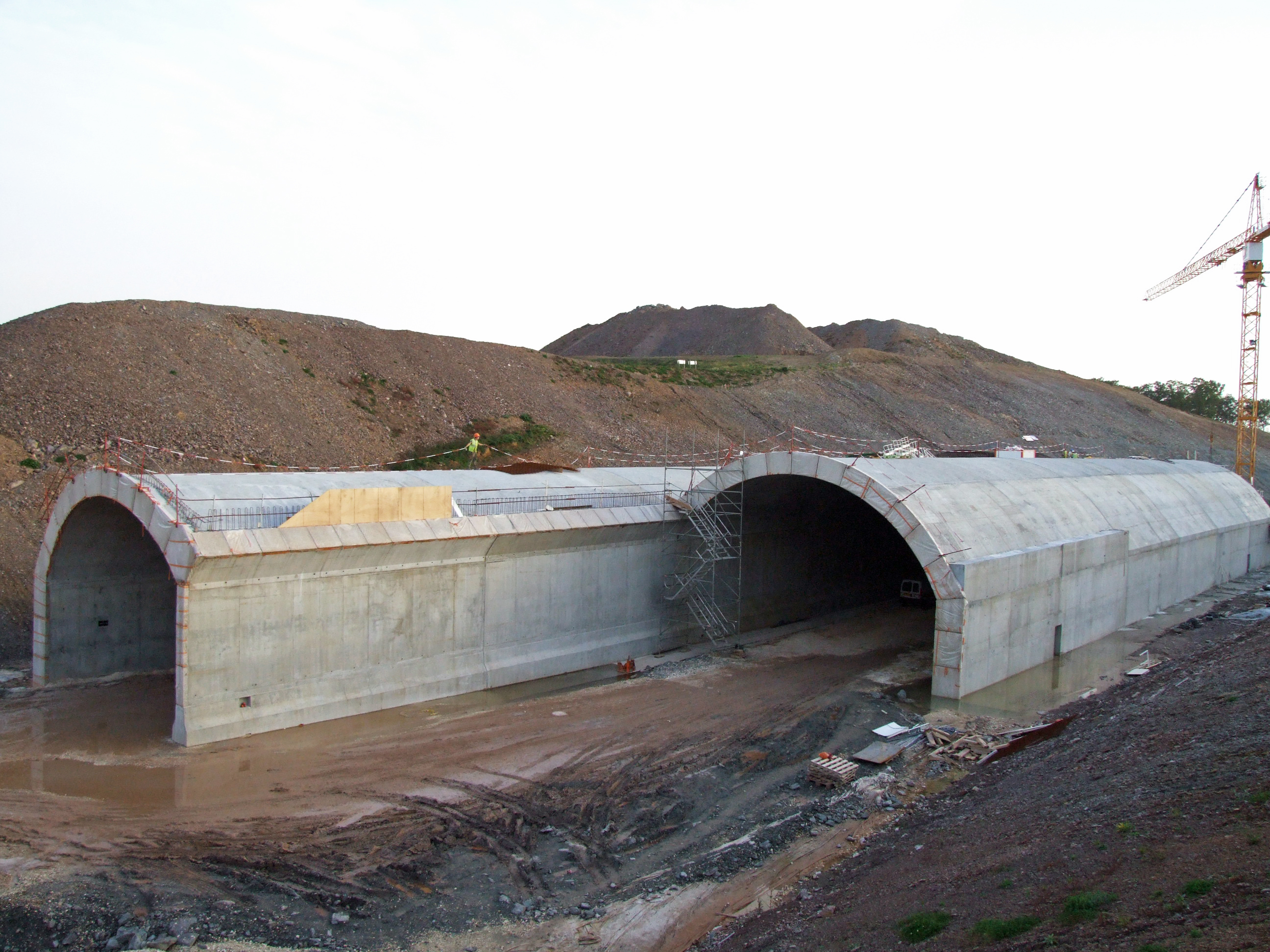 A89 - Construction du tunnel de la Crête - Les deux tubes terminés côté Bordeaux avec le décalage entre les deux tubes